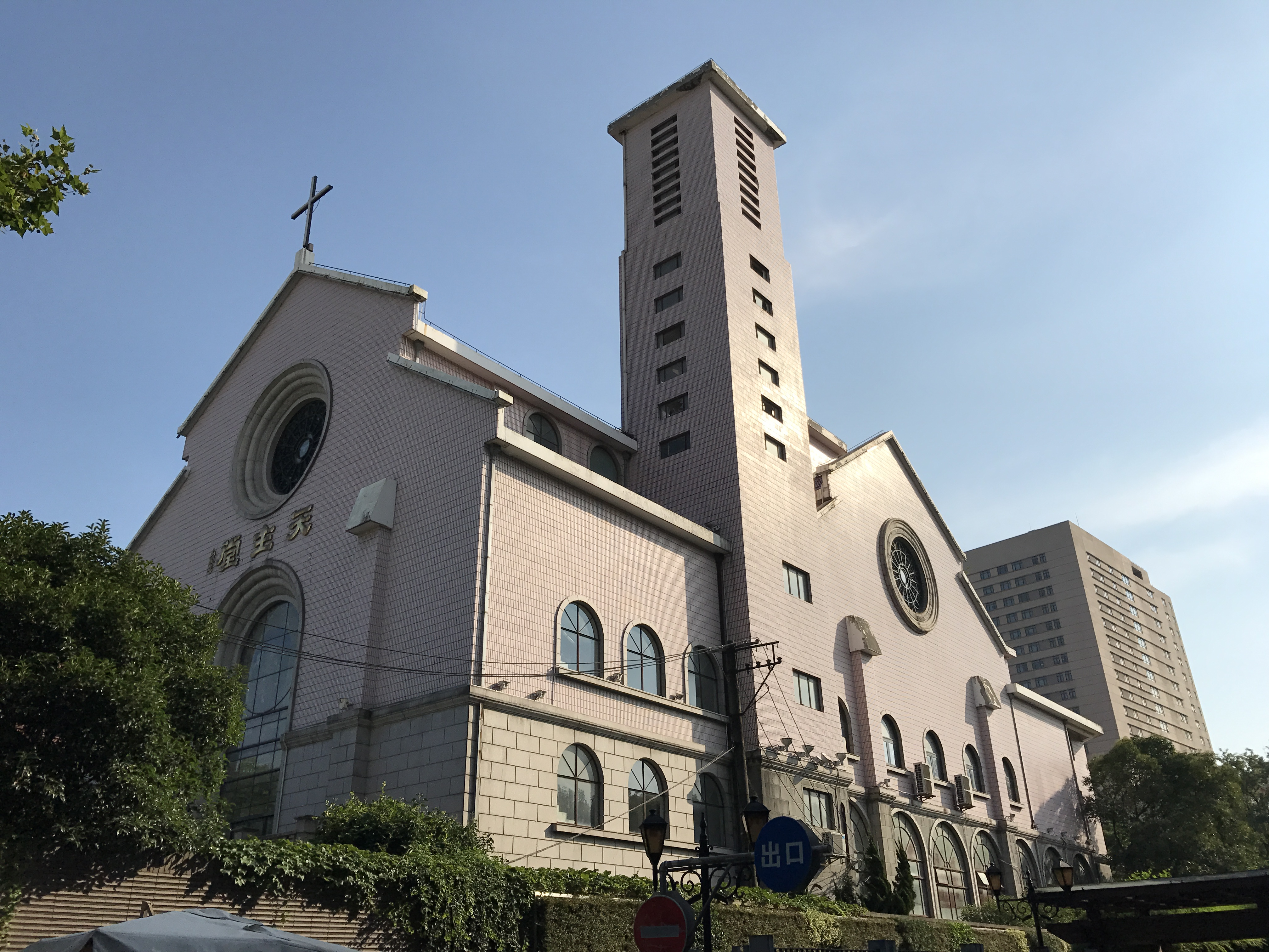 圣伯多禄堂 重庆南路270号